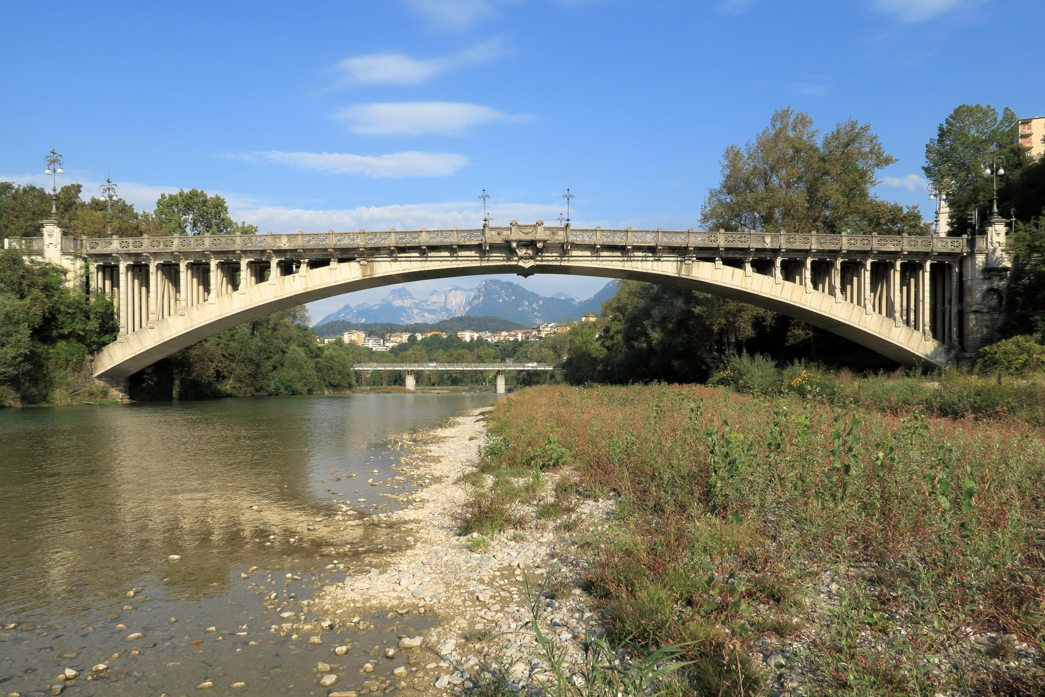 Ponte della Vittoria Lato Est This is a photo of a monument which is part of cultural heritage of Italy.